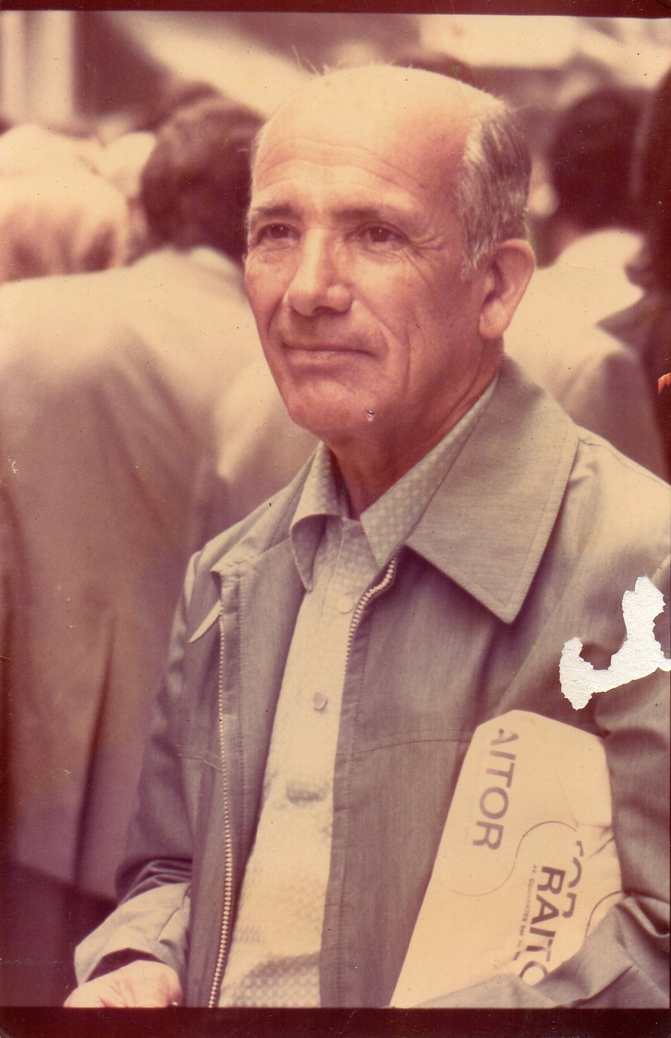 Buenos Aires, Argentina